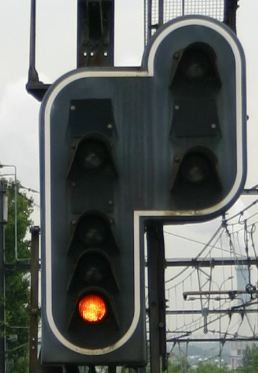 Signal SNCF type avertissement : jaune fixe : commande un ralentissement, de sorte que le train soit en mesure de s'arrêter devant le prochain signal, qui commande un arrêt. jaune clignontant : « pré-avertissement ». Sur les lignes rapides, ou si le canton protégé est court, informe le mécanicien que le prochain signal se trouve à l'avertissement (orange fixe).